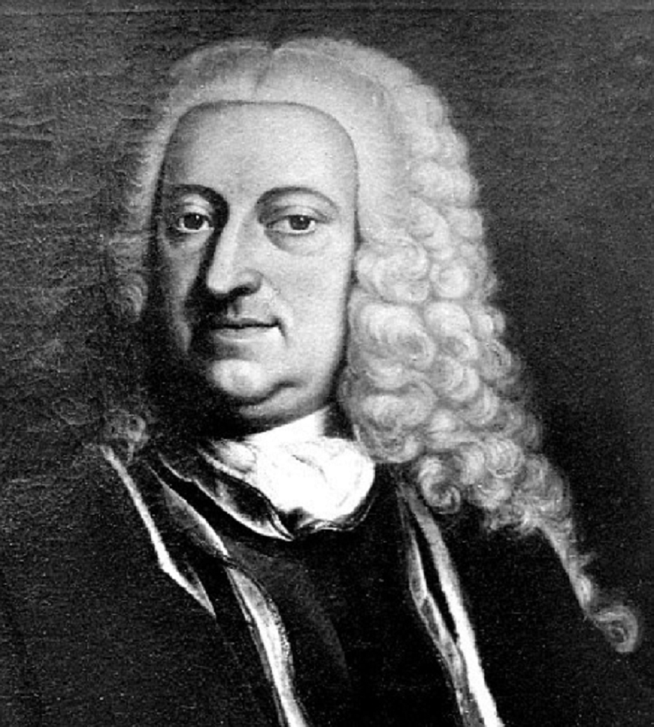 Portrait Karl August (* 17. September 1685 in Weilburg; † 9. November 1753 ebenda), von 1719 bis 1753 Fürst von Nassau-Weilburg